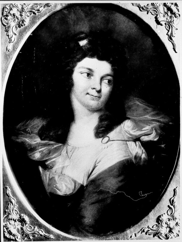 geb. Heun, verh. Heinsius (* 24. Februar 1773 in Dobrilugk; † 1826), Pseudonym Lotte Berthold, deutsche Schriftstellerin. Objektbezeichnung: Gemälde Material/Technik: Pastell; Kreide (Material) Maße: Höhe x Breite: 50 x 38 cm Wer: Caffe, Daniel (Maler) (wann): 1791 Bezug (was): Porträt einer weiblichen Person (HEINSIUS, Charlotte) (allein); Bürger(liche) Klassifikation: Tafelmalerei (Gattung) Standort: private Sammlung (Leipzig)